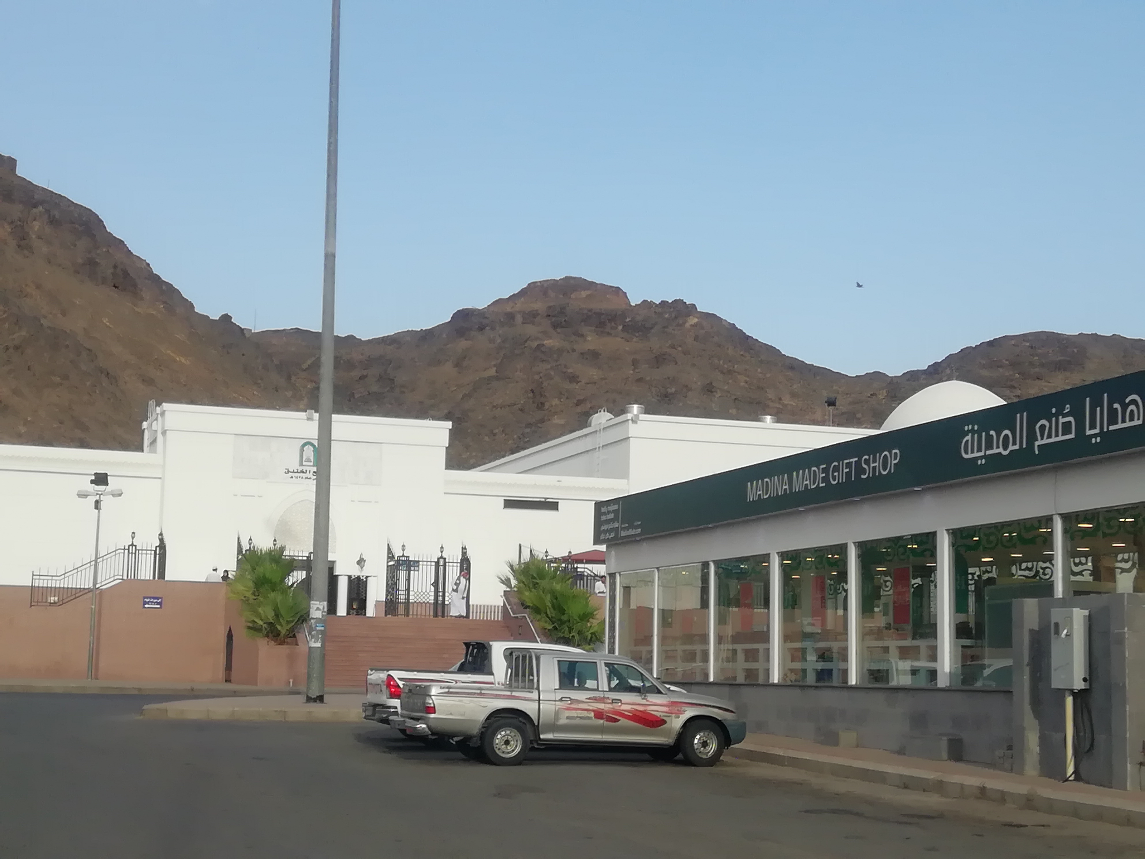 al-Madinah al-Munawarah Salaa mountain Seven mosques area Khandaq mosque Madina made